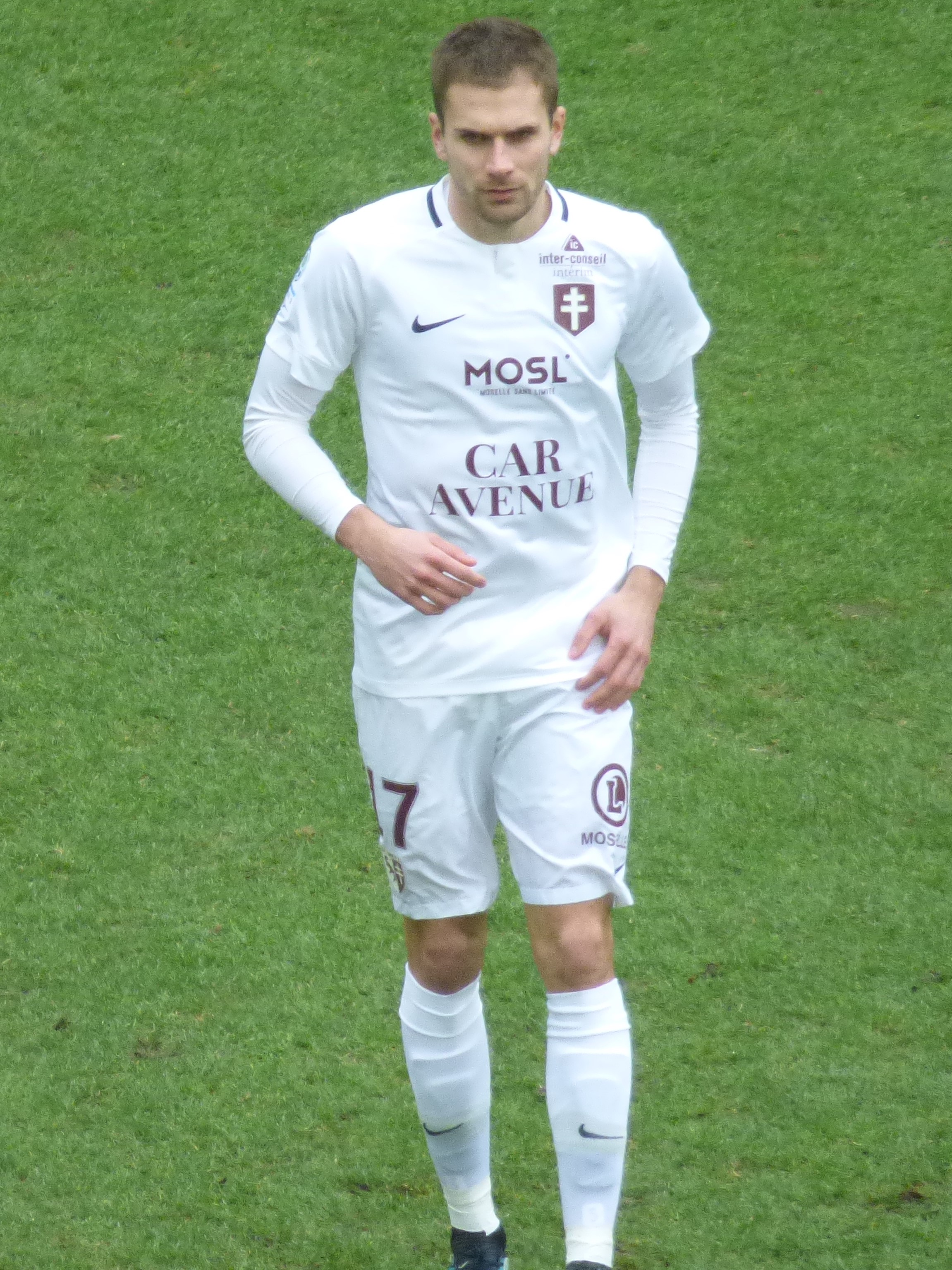 Thomas Delaine avant le match RC Lens / FC Metz, comptant pour la vingt-quatrième journée du championnat de France de Ligue 2 2018-2019, le 9 février 2019, au Stade Bollaert-Delelis.